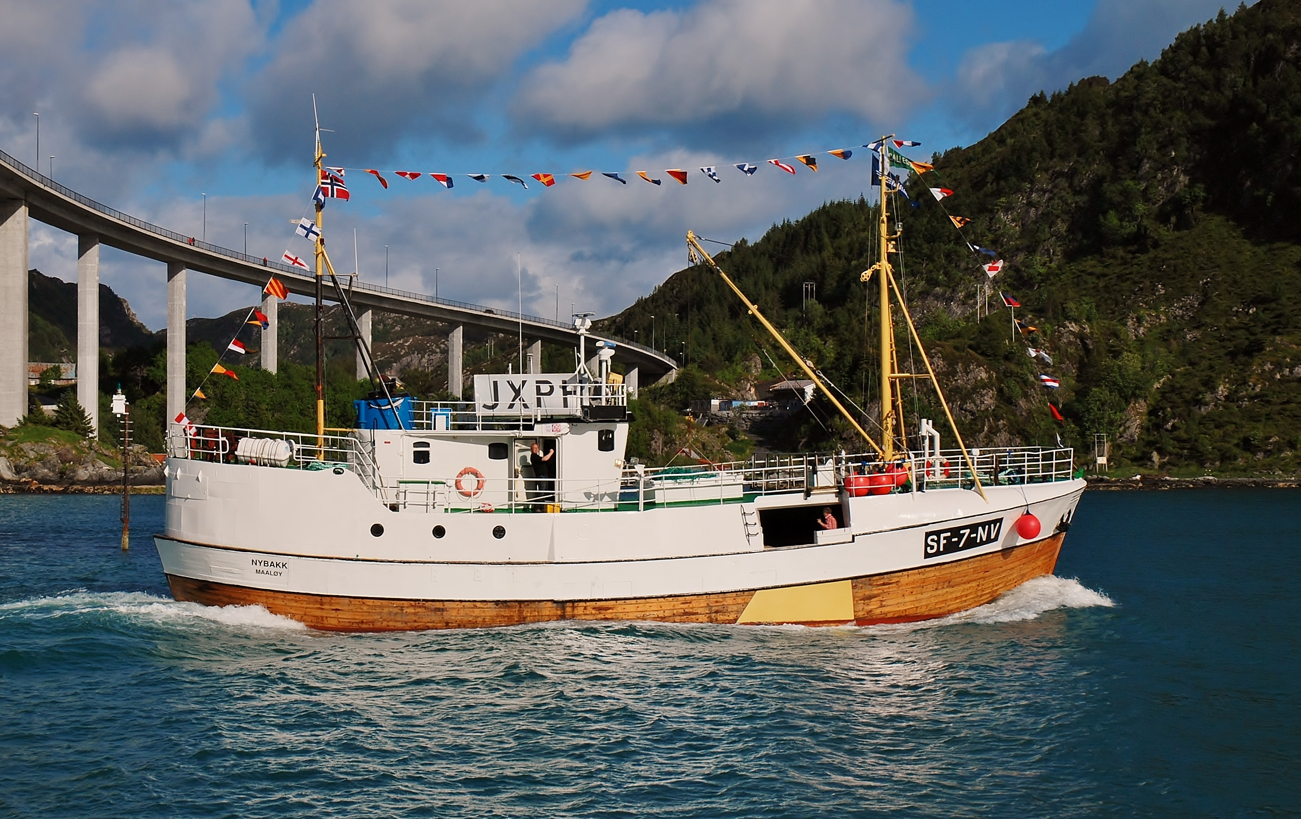 MS «Nybakk» er ei kravellbygd skøyte frå 1961. Båten blei bygd på Vaagland Båtbyggeri og kontrahert av Albert Nybakk og dei fire sønene hans. «Nybakk» blei bygd som ein line- og garnbåt, men på slutten av 1970-tallet og fram til 1997 ble det berre drive garnfiske frå båten. «Nybakk» hadde som ny ein Union på 160 hk, og i 1967 blei det installert ein Callesen på 460 hk. I 2007 overtok MS Nybakks Venner som eigarar, og fartøyet blei friteke kondemneringsordninga i 2008. M/S Nybakks Venner har planar om å setje fartøyet tilbake slik det så ut i 1984 etter retningslinjer frå Riksantikvaren. «Nybakk» blir i dag nytta til å vise fram båtbyggjarfaget, kystkultur og det har vore flere utstillingar om bord. «Nybakk» er også jamnleg på besøk på Shetland og Orkenøyene og det er planar om å besøke Hebridane og Færøyane. Det var på felta rundt disse øyene «Nybakk» i si tid fiska. Kjelde: Norsk forening for fartøyvern ( Eigaren vil at «Nybakk» skal stå fram som ein levande båt og ein kulturinstitusjon.